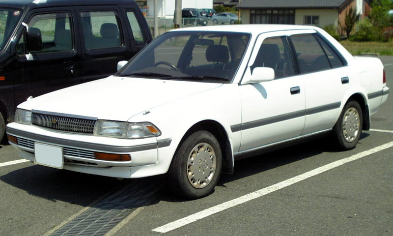 โตโยต้า โคโรน่า โฉมที่ 9.